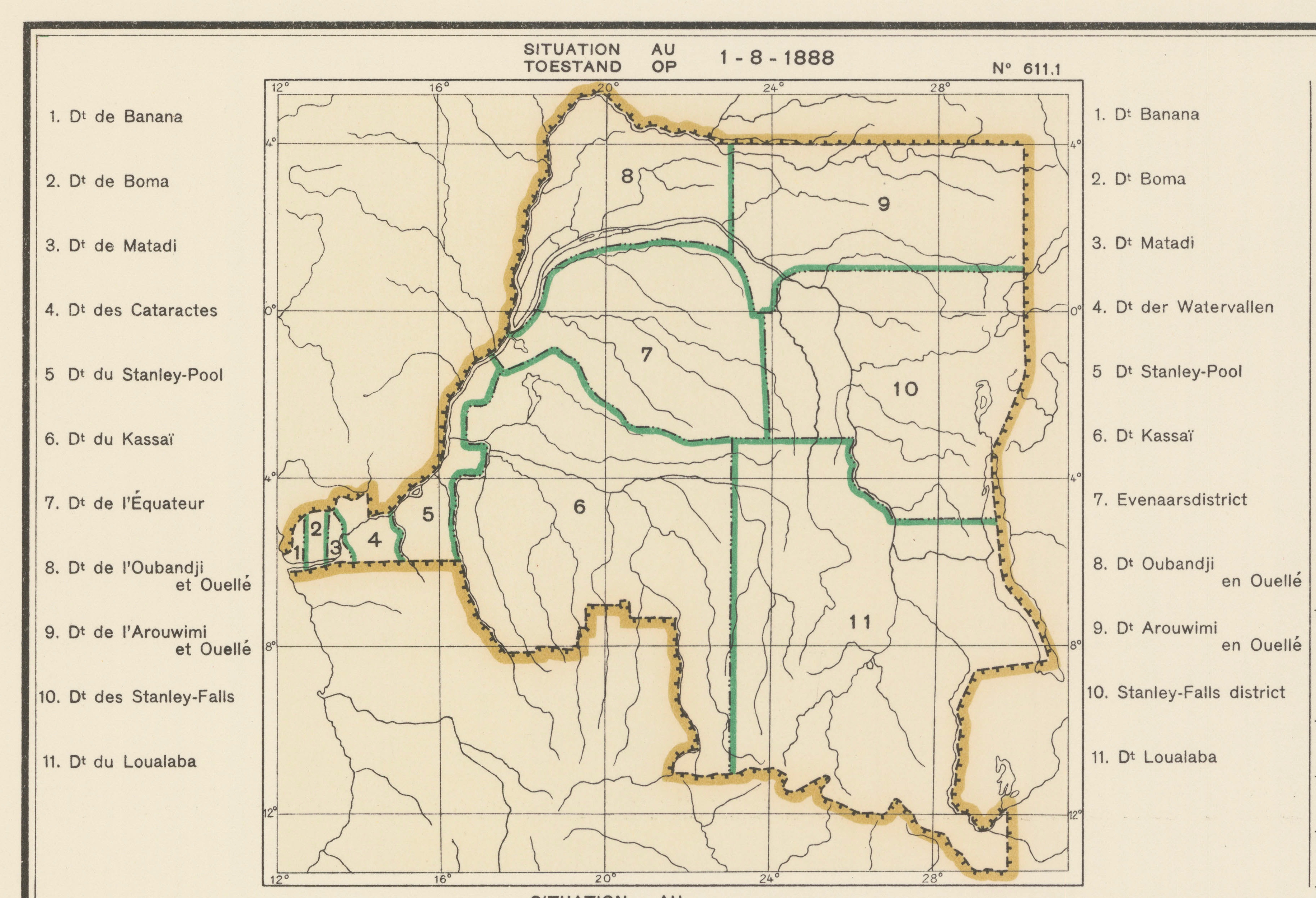 Carte des subdivisions administrative